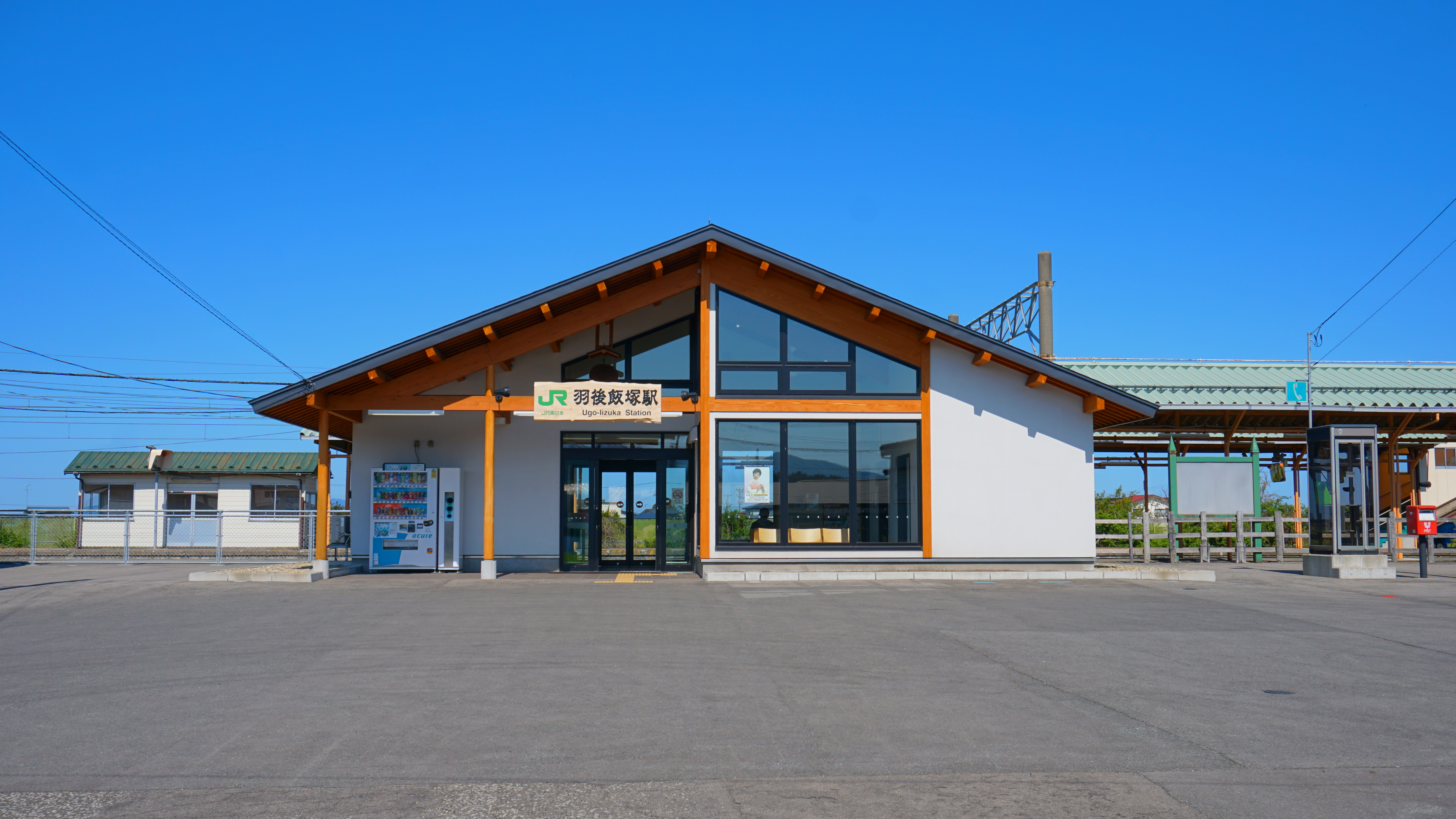 奥羽本線 羽後飯塚駅